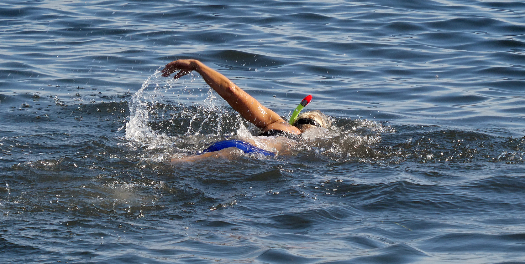 En snorklare vid Ystads Saltsjöbad 2020.